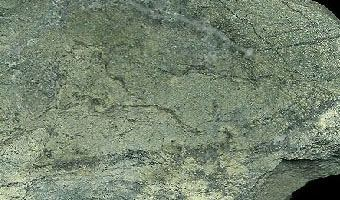 Hornfels - Kohútovo, Štiavnické vrchy, Slovakia.